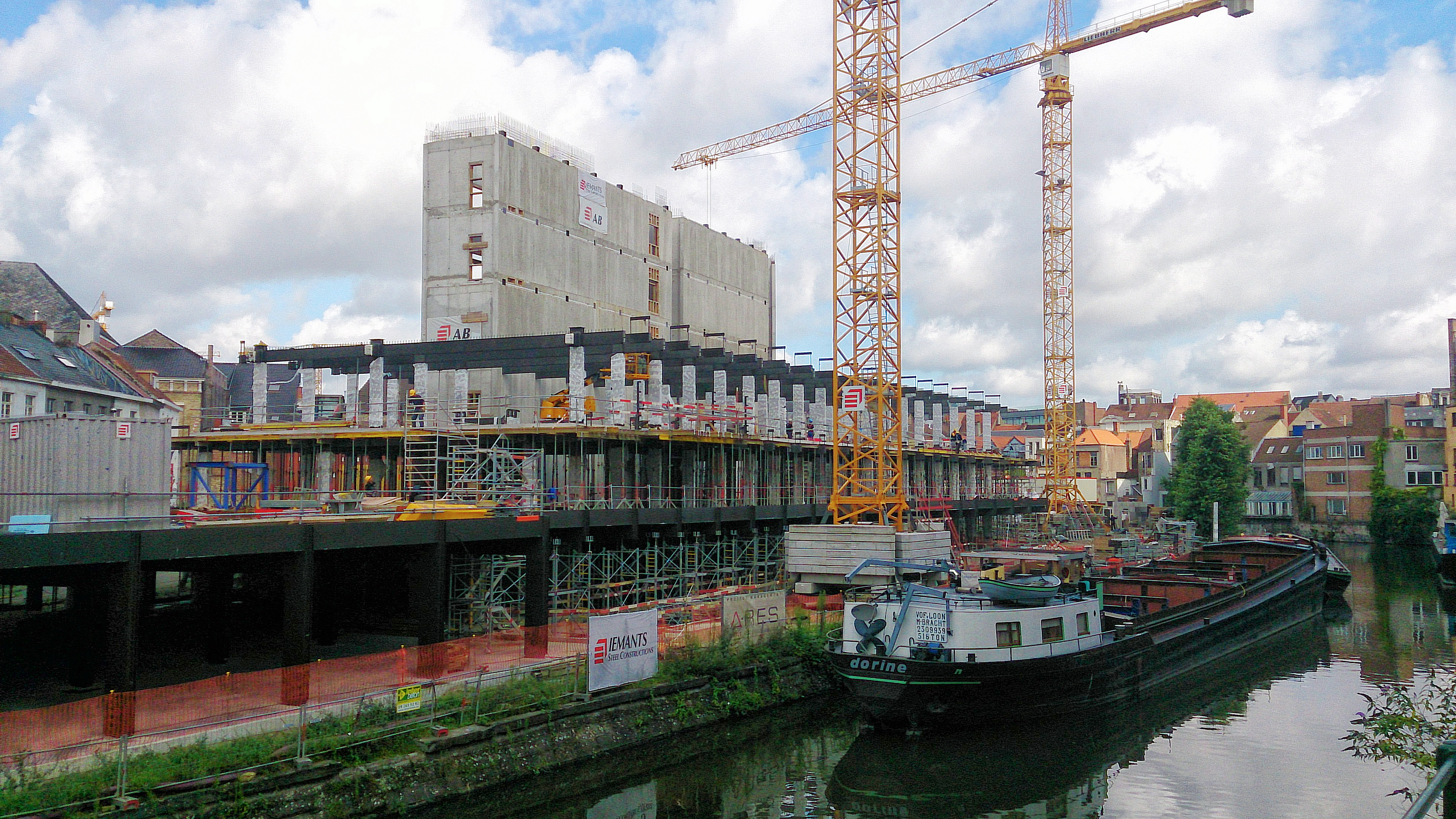 Gent - De Krook in opbouw augustus 2014